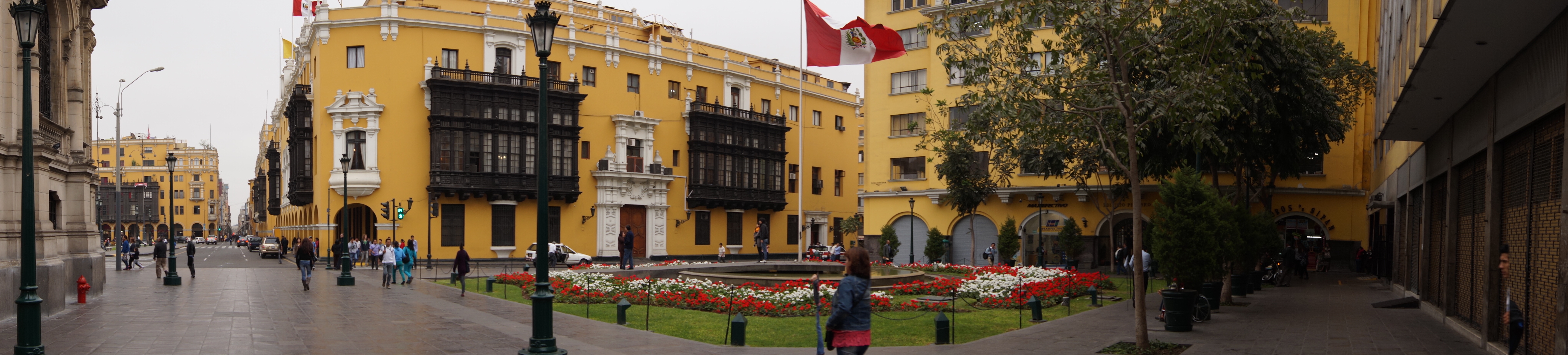 Plaza Perú